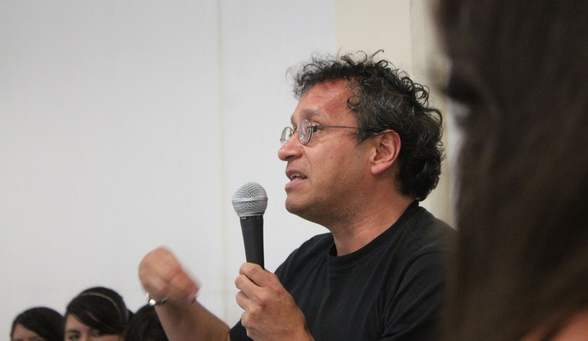 Ricardo